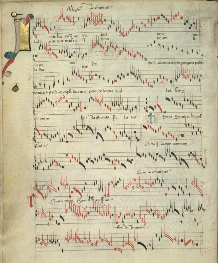 Modena BE α. 5,25